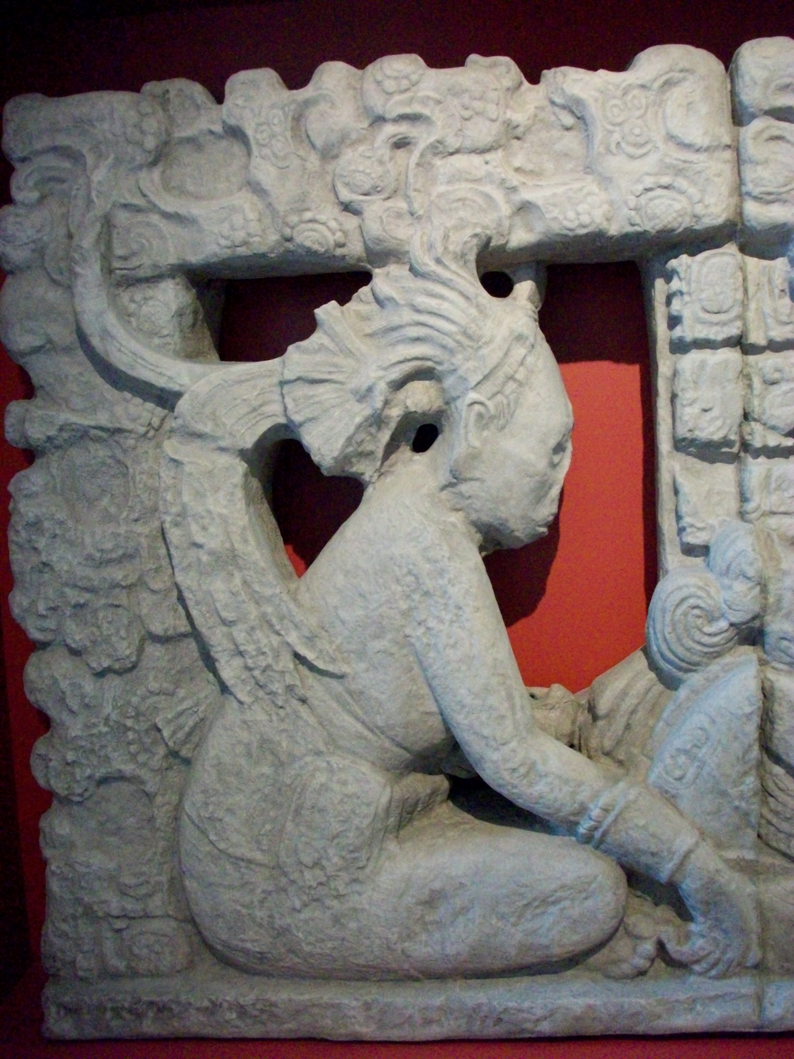 Escultura de la diosa maya Ixchel en la Montaña Sagrada previo a la creación del mundo. Copia de un respaldo de trono labrado en piedra caliza. Cuenca del río Usumacinta, Chiapas. Clásico tardío. Museo Amparo, Puebla.